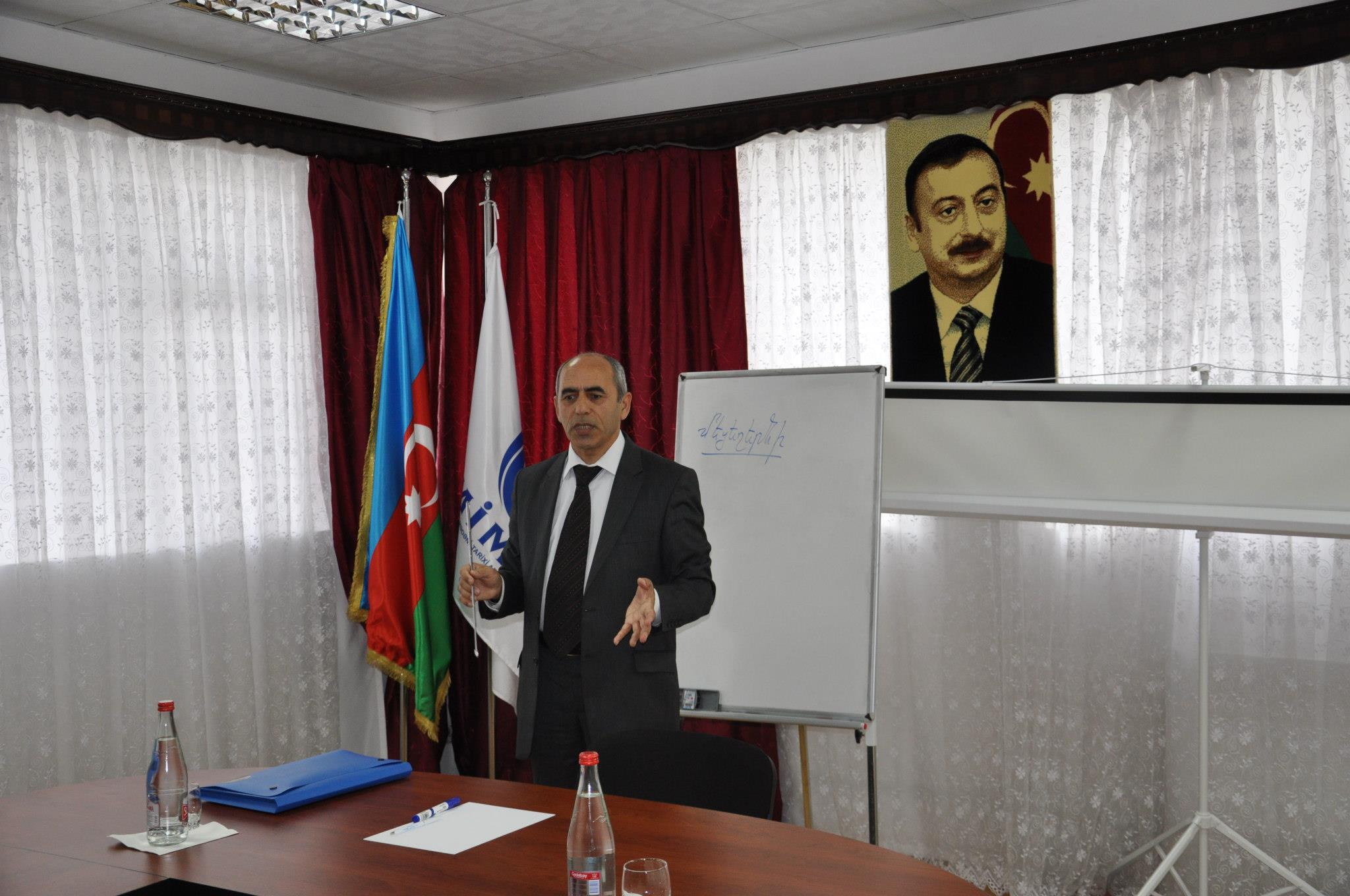 Ermənilərin mənşəyi